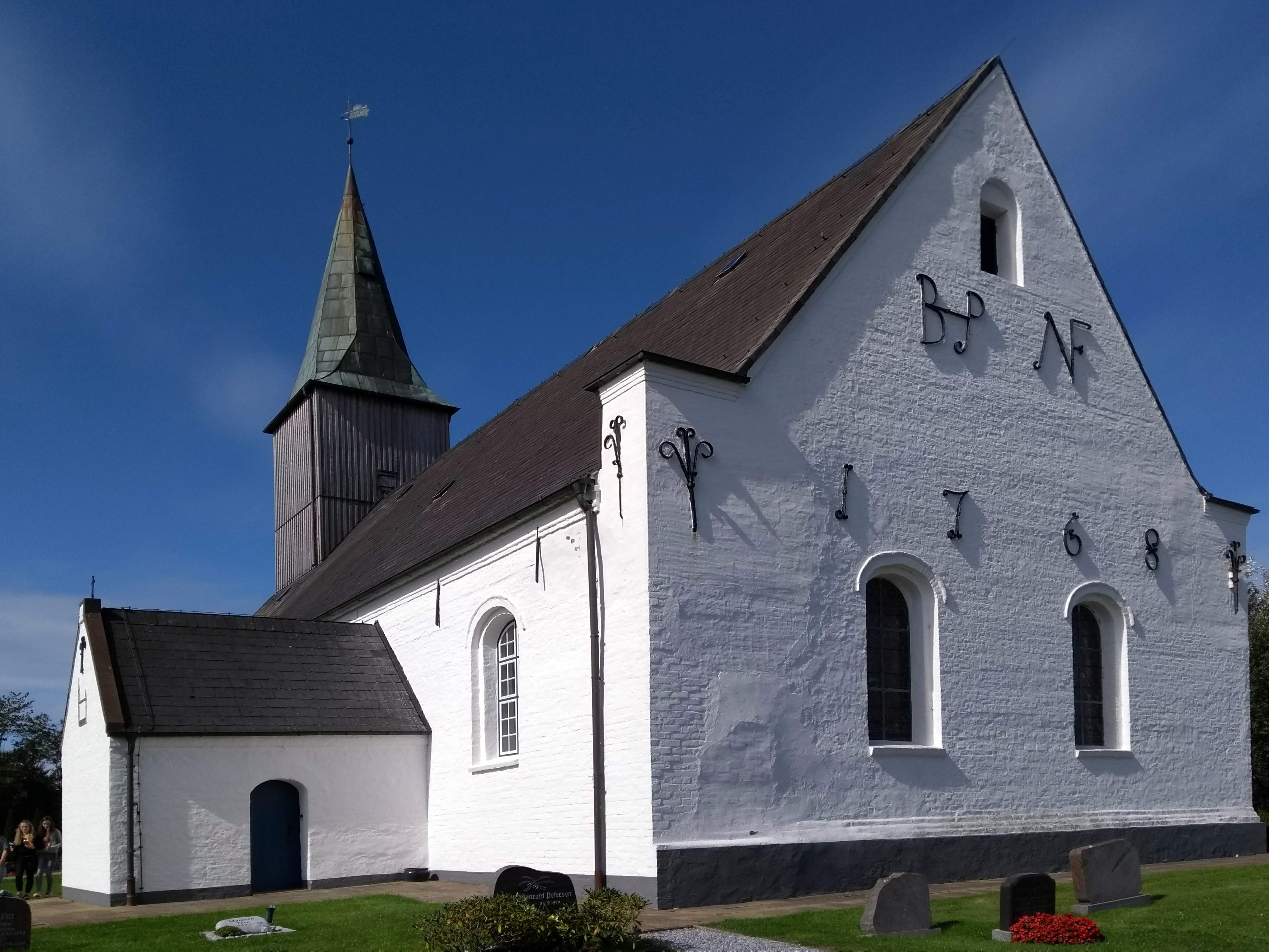 Die 1768 erbaute Rimberti-Kirche in Emmelsbüll von SO - sichtbar sind die Ostwand mit den Mauerankern sowie das 1769 fertiggestellte Vorhaus